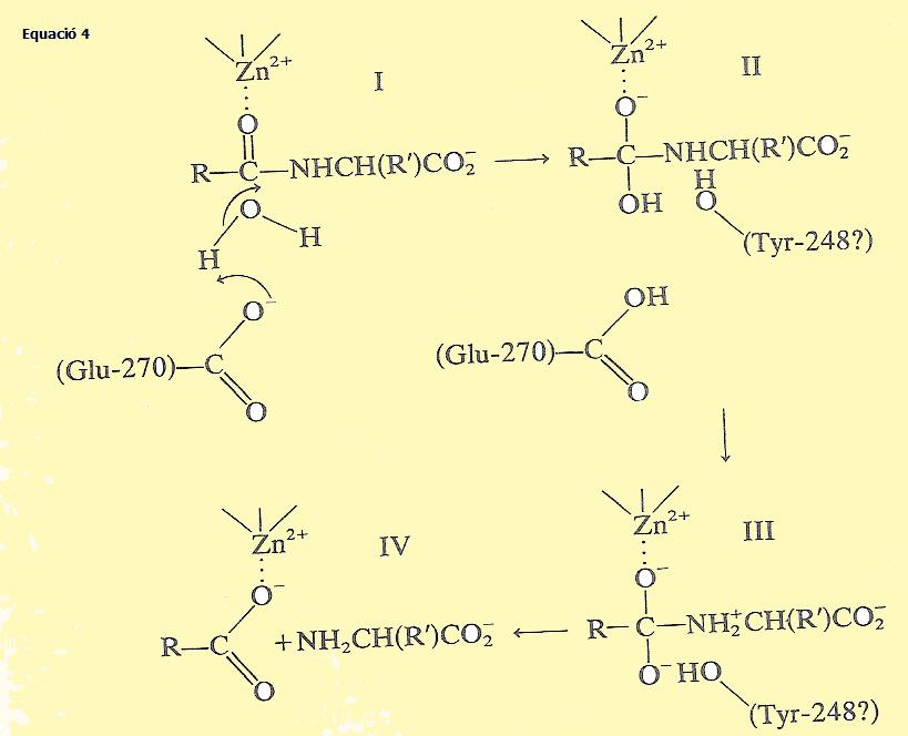 adaptació. l’observació que el metanol no pot substituir l’aigua en la reacció solvolítica ha conduit al mecanisme proposat